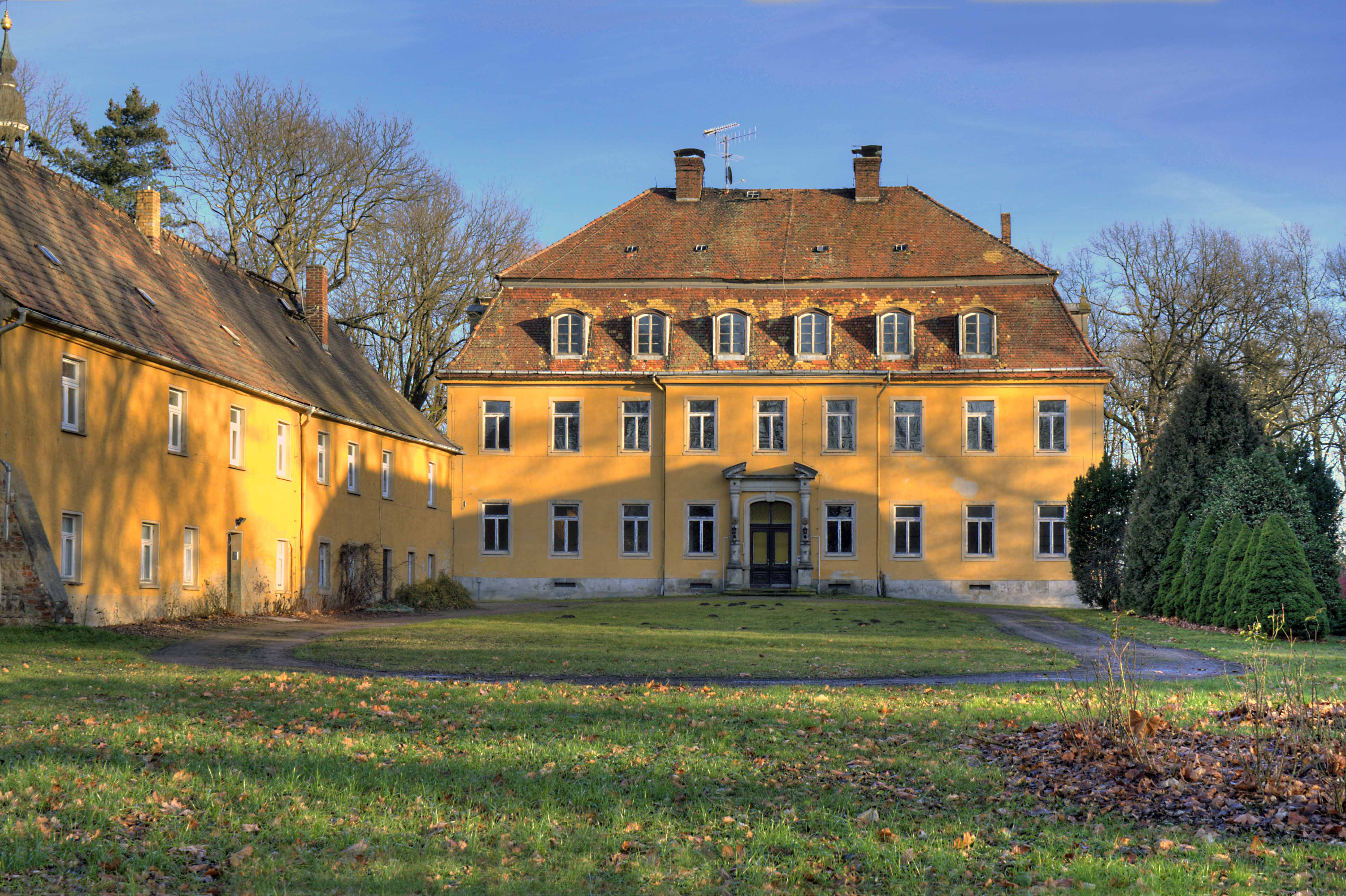 Schloss Börln, Clara-Zetkin-Straße 1 ff. in Dahlen Stt Börln